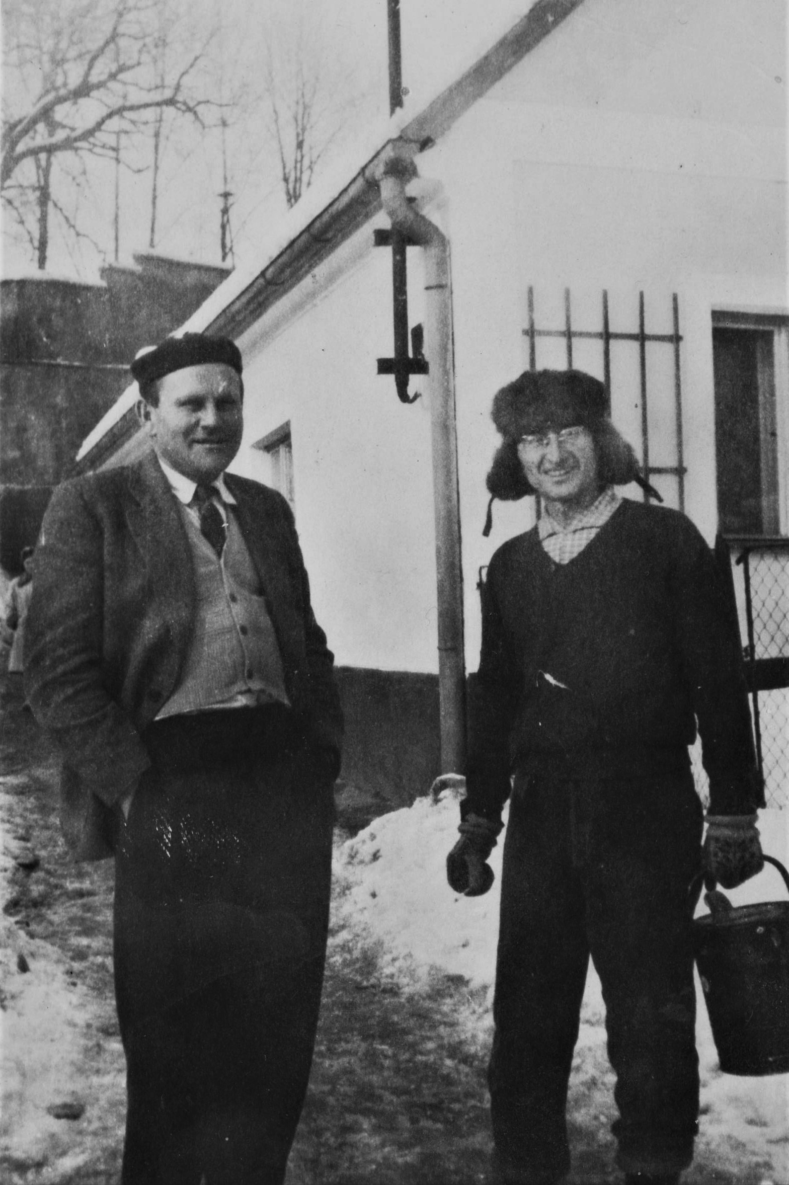 Merth se sousedem v Jindřichove Hradci, 50. - 60. léta (soukr. archiv)